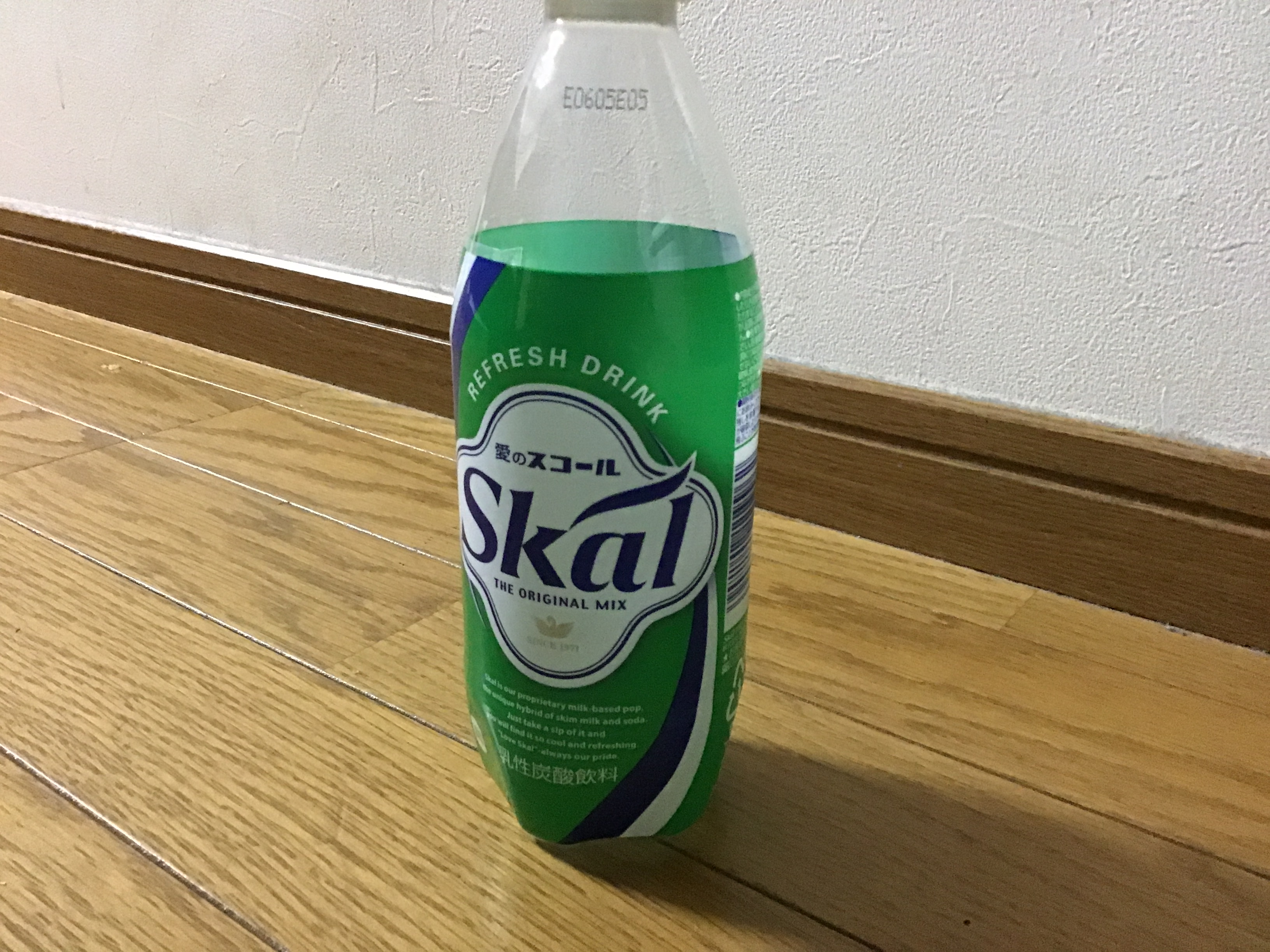 スコールコカコーラ版。2019年撮影。